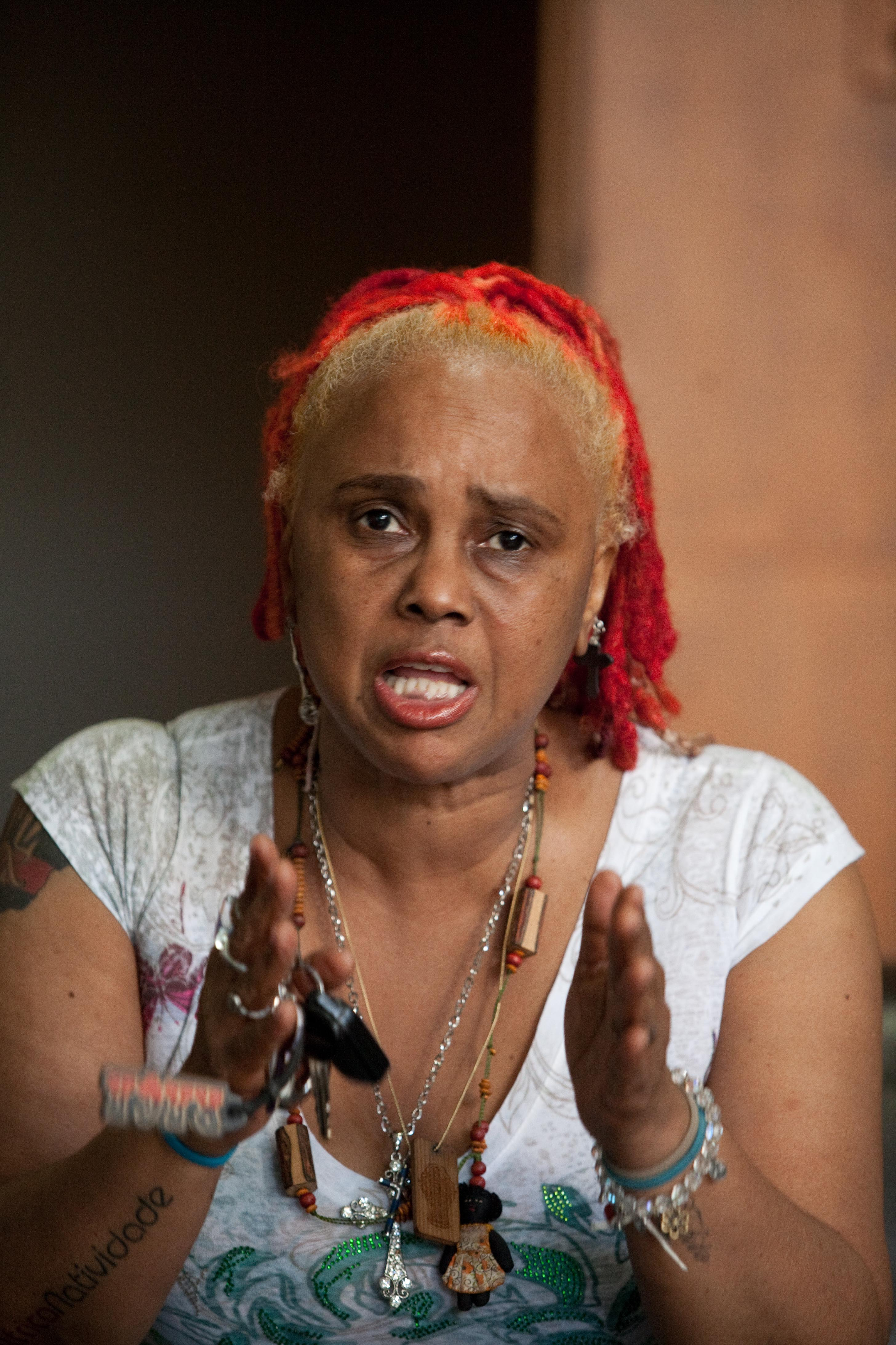 Reunião com Aloísio Teixeira - Reitor da UFRJ e comissão de artistas Sandra de Sá e Wagner Tiso © Pedro França